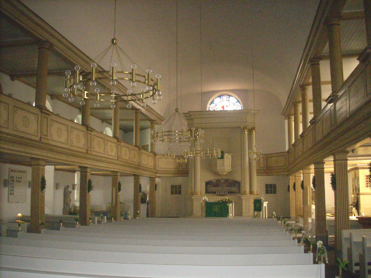 Burgdorf (Region Hannover), Ev.-luth. St.-Pankratius-Kirche (Burgdorf), Inneres/Inside. Altarbild von/altar painting by Carl Wiederhold